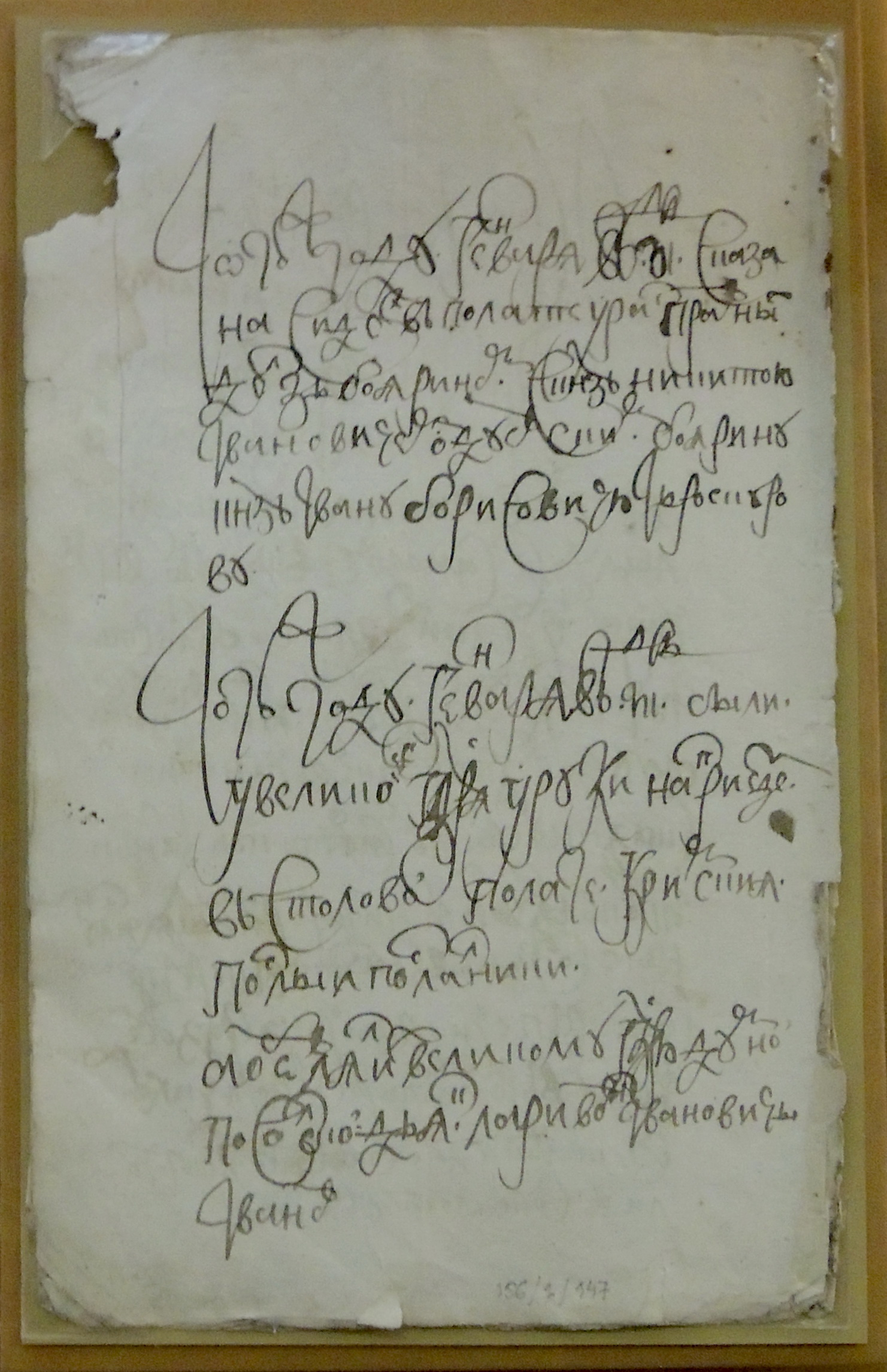 Запись в Разрядной книге: Тогож [7190=1682] году генваря въ 17 день сказана сидети въ полате у расправных дѣл зъ боярином с князь Никитою Івановичем Одоевским боярину князь Івану Борисовичю Търоекурову. Тогож году генваря въ 18 день были у великого государя у руки на приезде въ Столовой полате кримския послы и послальники. А объевлял их великому государю думной посольской дьяк Ларивон Івановичь Іванов. (РГАДА)